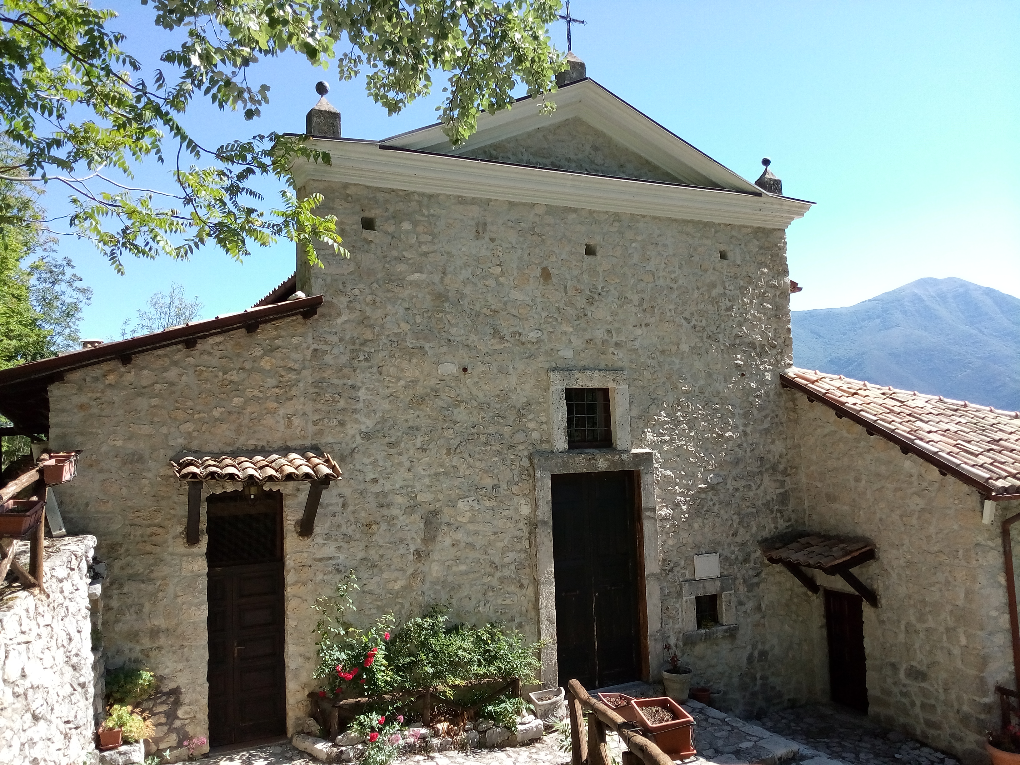 Santuario della Madonna delle Grazie a Roccavivi in Abruzzo